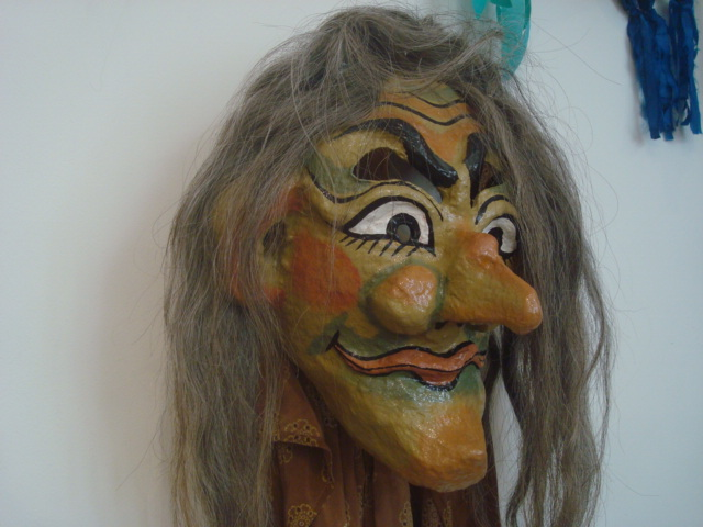 Máscara artesanal costarricense.